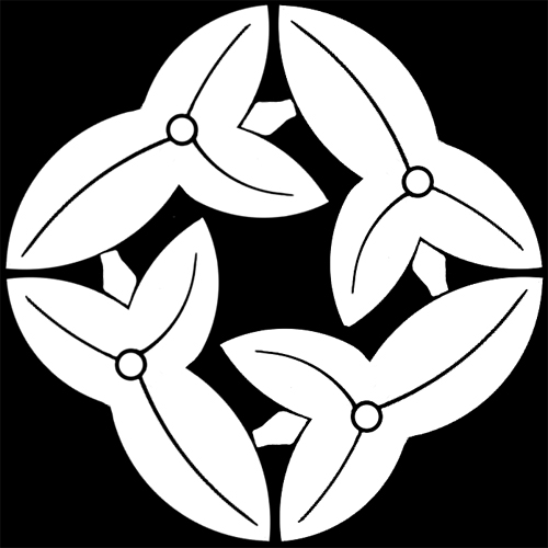 「四つ澤瀉」紋（染抜）